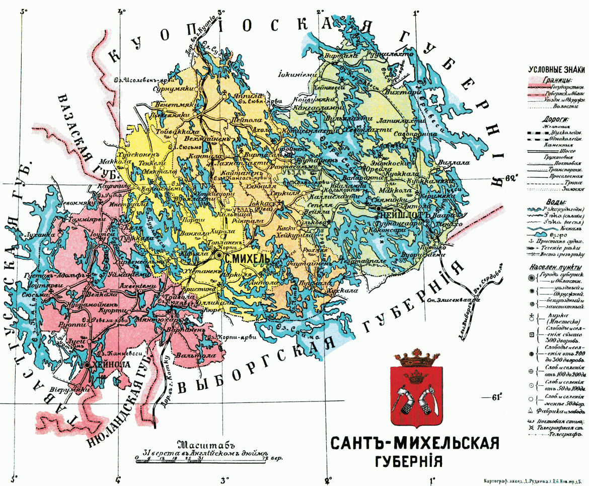 Карта Санкт-Михельской губернии Великого княжества Финляндского, 1913